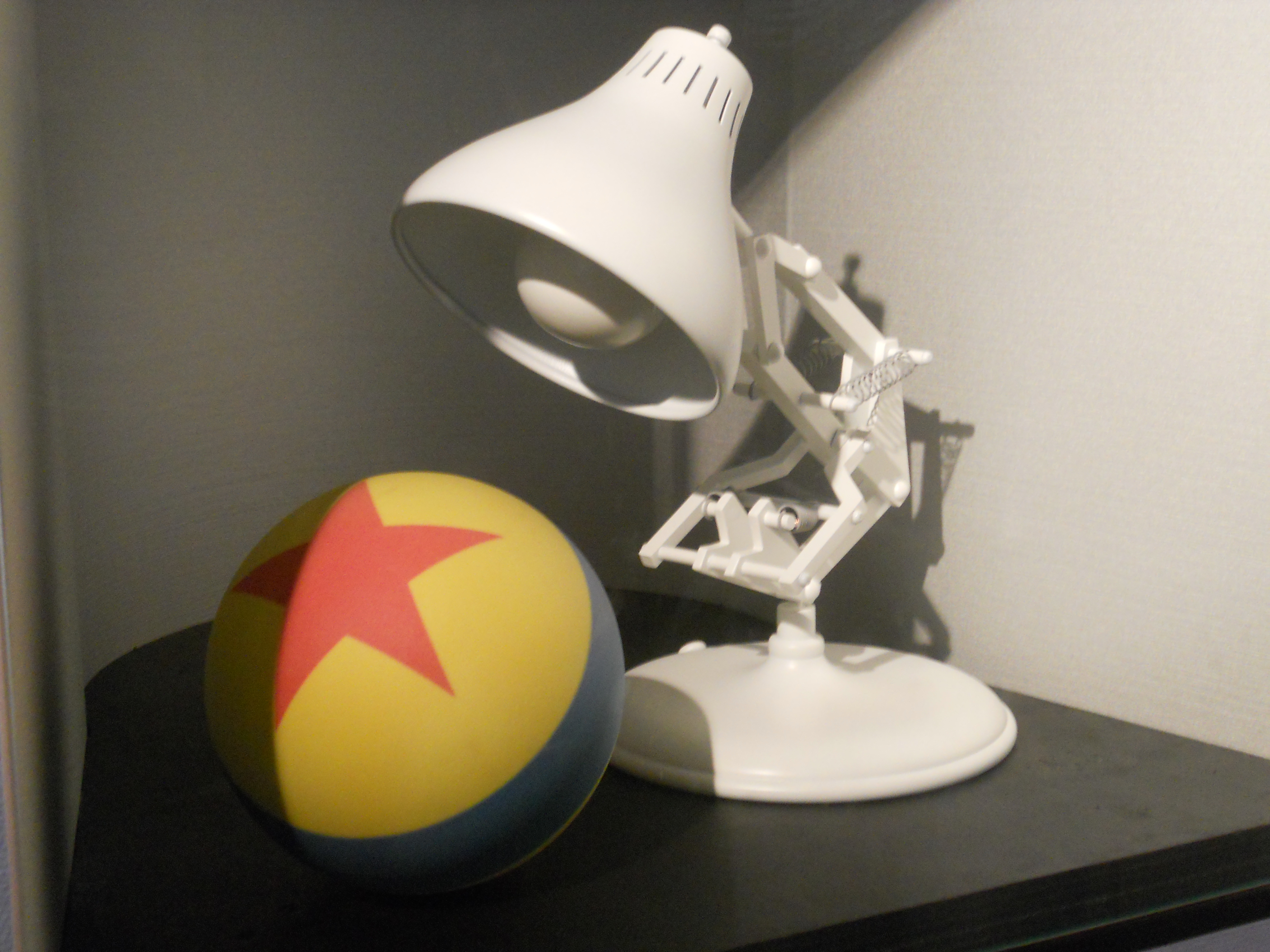 Mostra Pixar al PAC (Padiglione d'Arte Contemporanea) di Milano